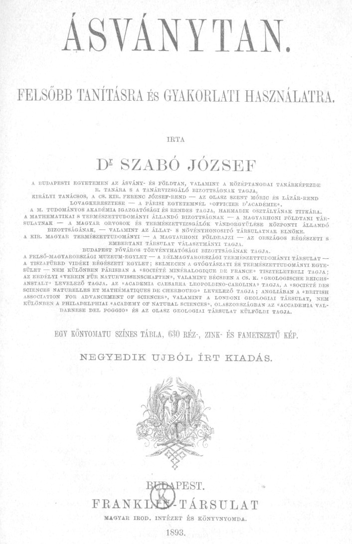 Szabó József (1822-1894) bányamérnök magyar nyelven megjelent "Ásványtan" című tankönyvének címlapja.